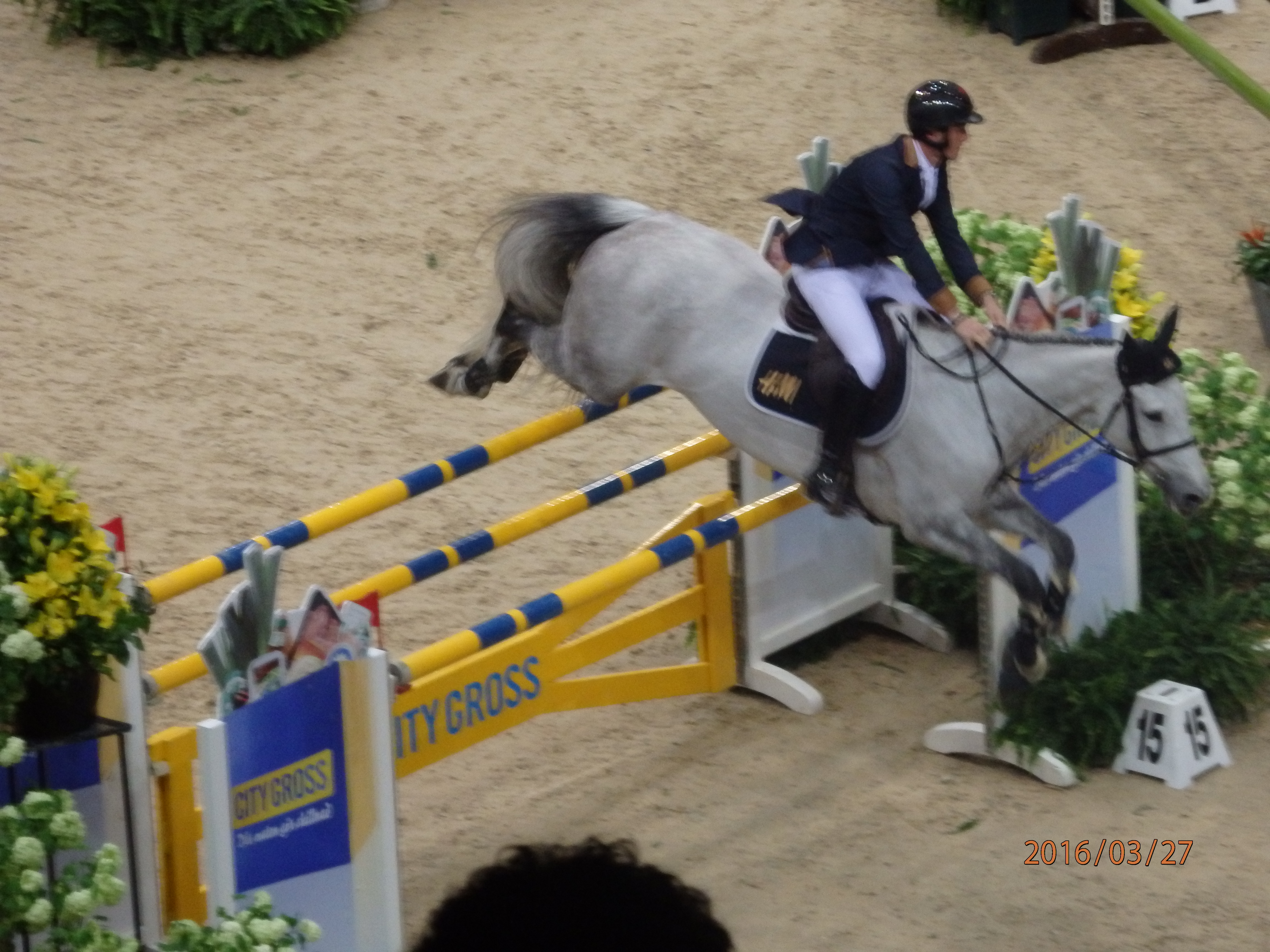 Olivier Philippaerts under Göteborg Horse show.